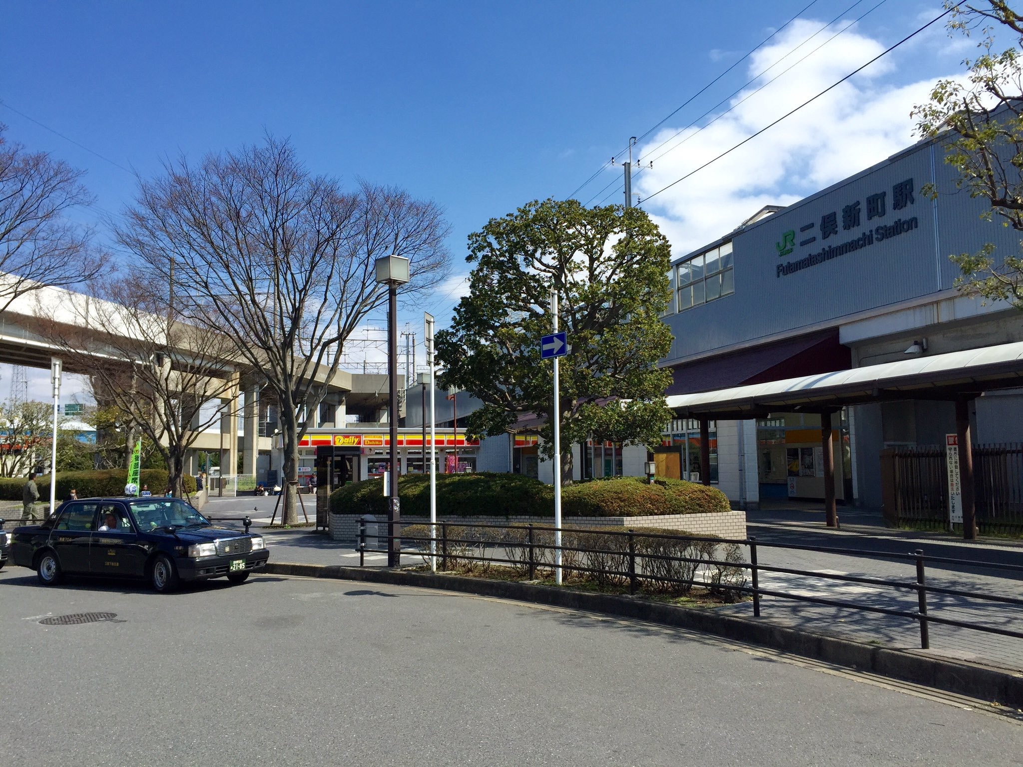 二俣新町駅